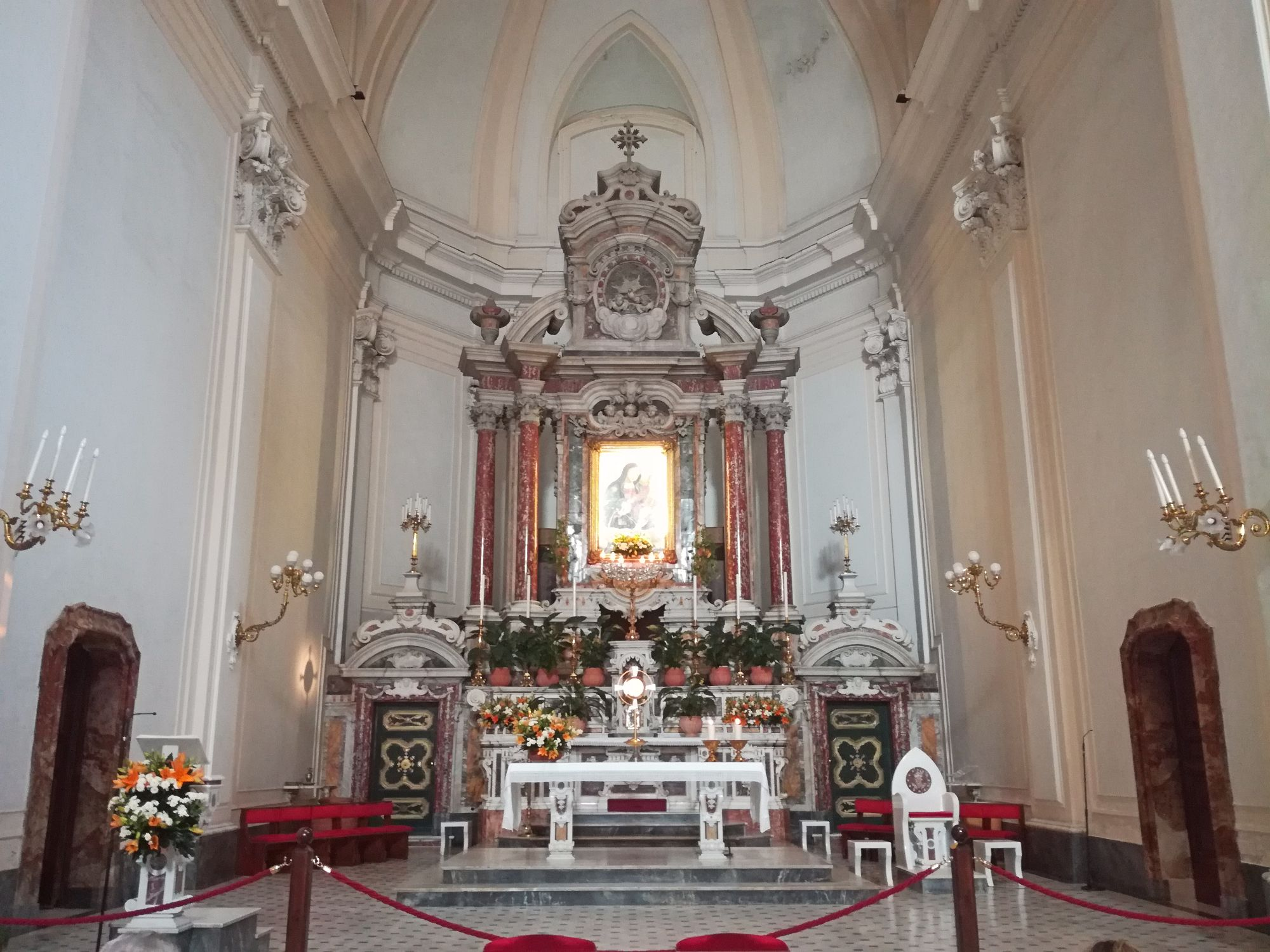 Abside, Santa Maria di Montesanto, Napoli